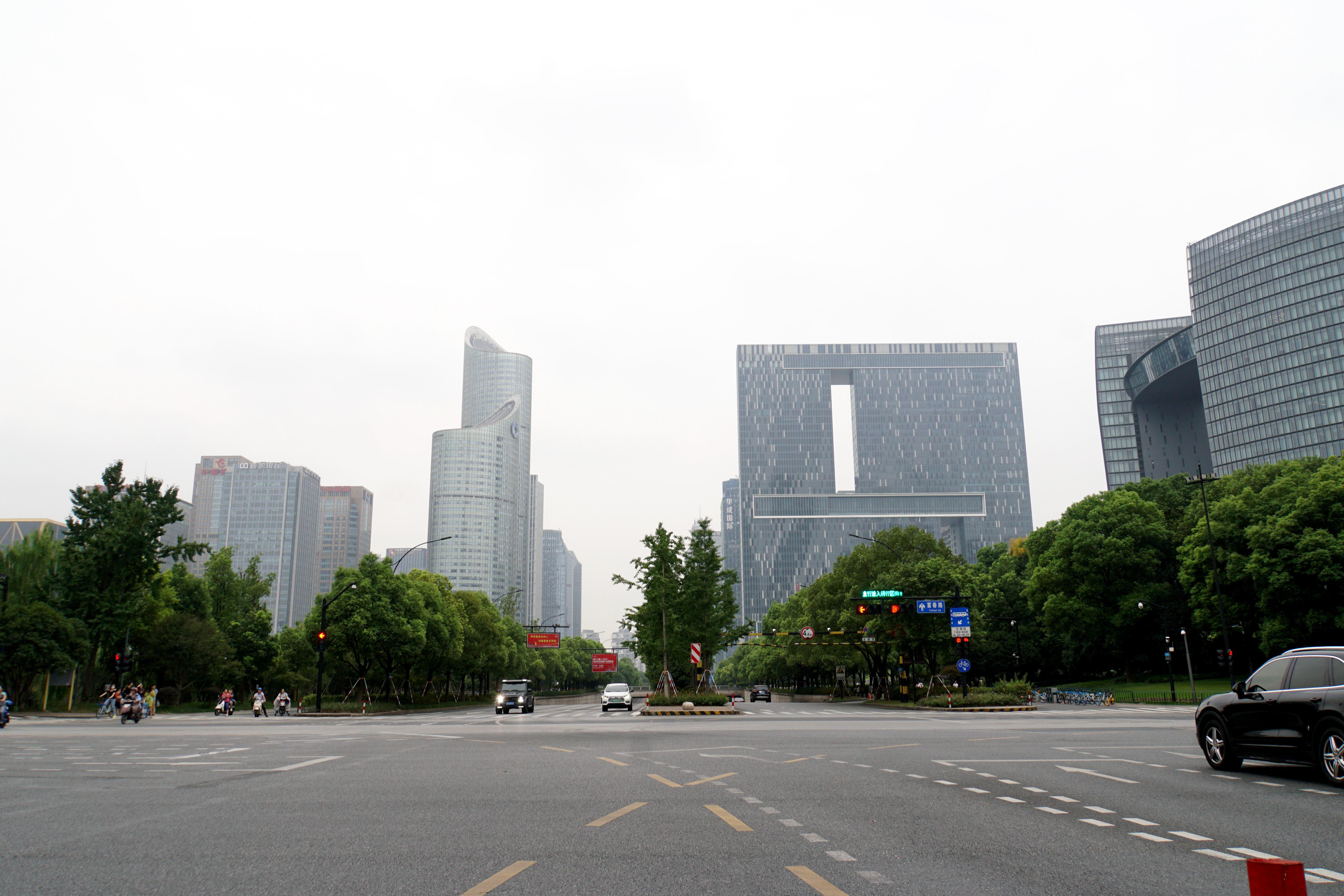 富春路新业路口